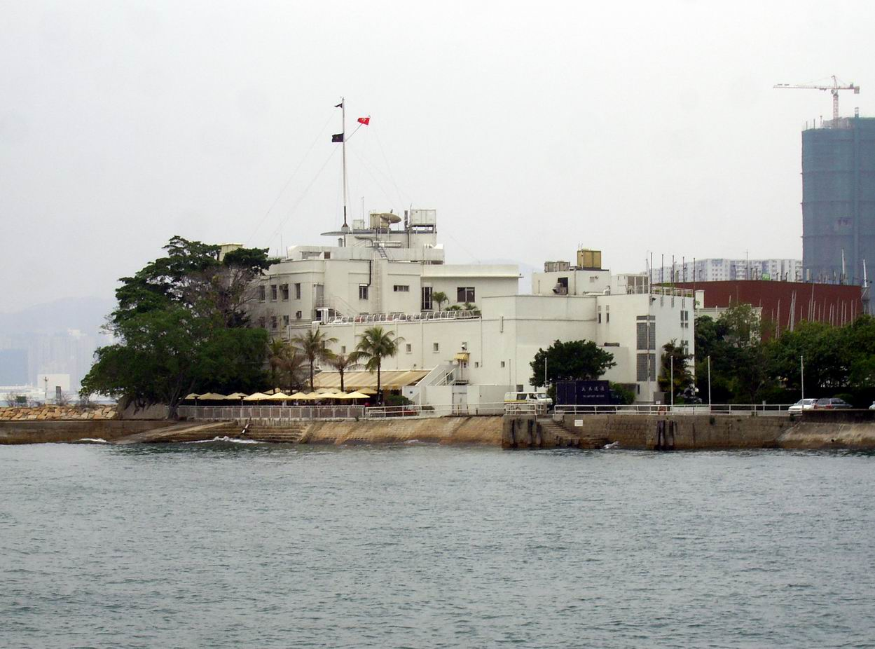 香港遊艇會會所大樓